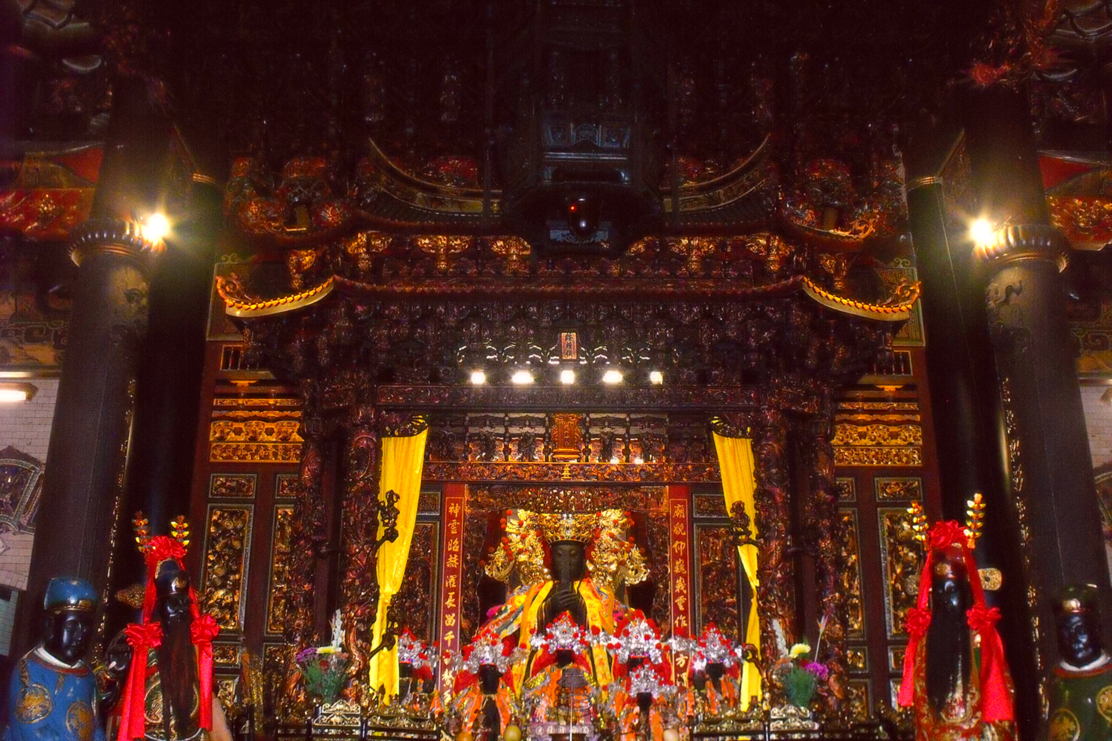 嘉邑城隍廟